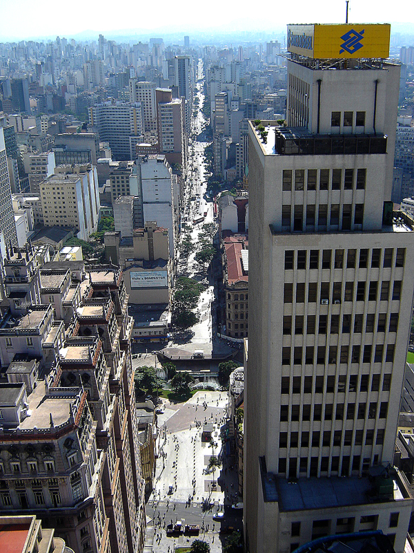 Avenida São João no centro de São Paulo.